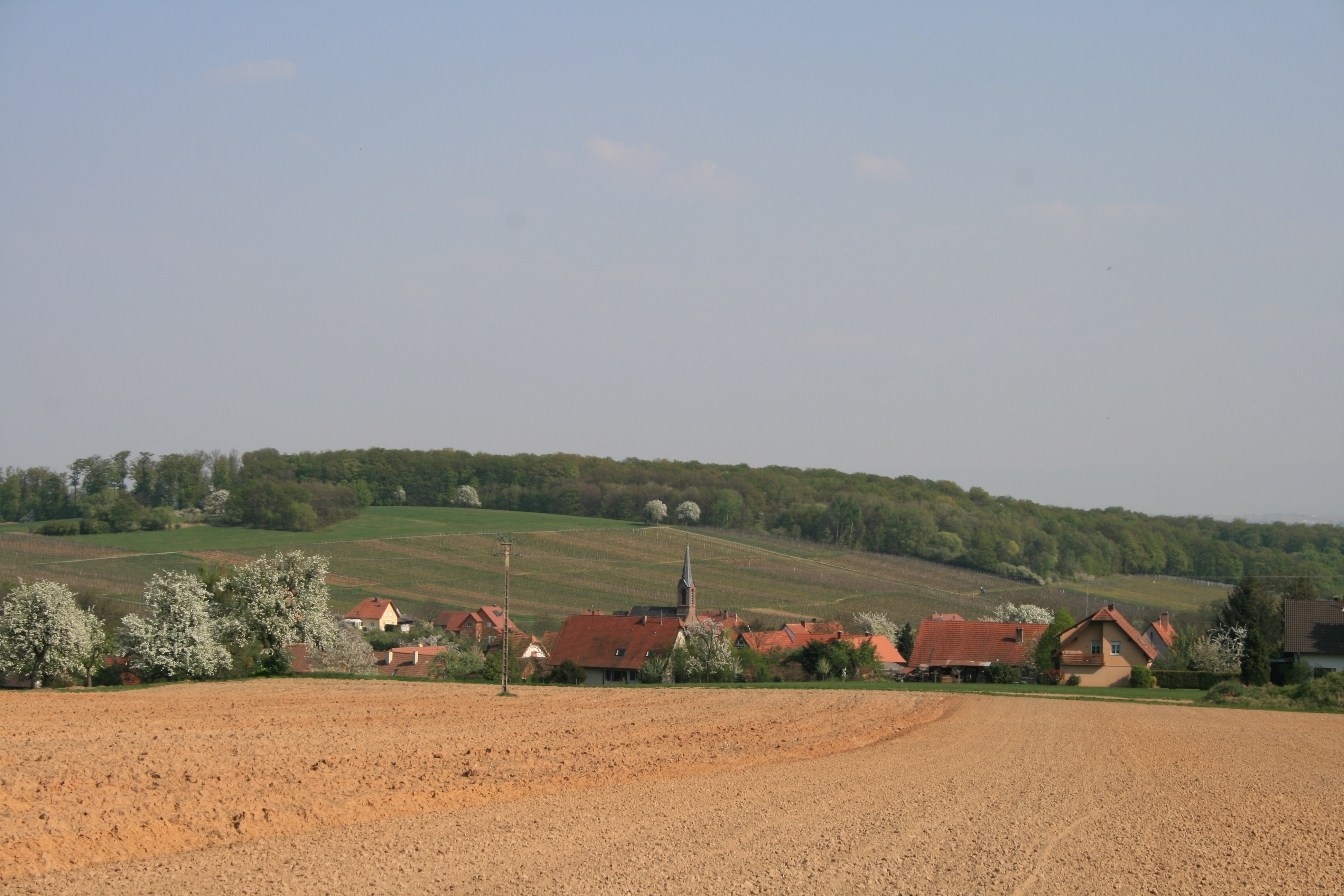 Cleebourg, Alsace